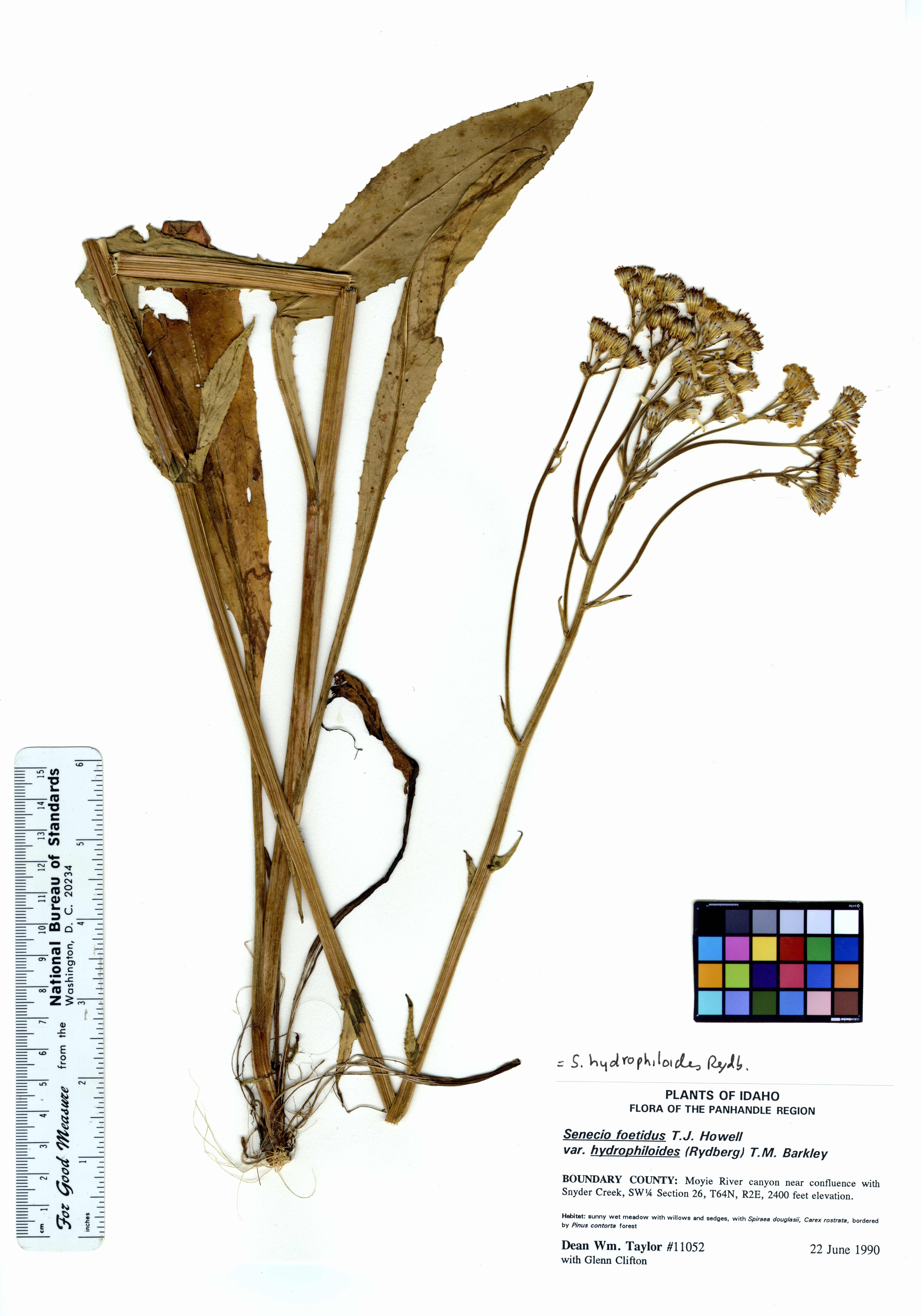 Senecio hydrophilus